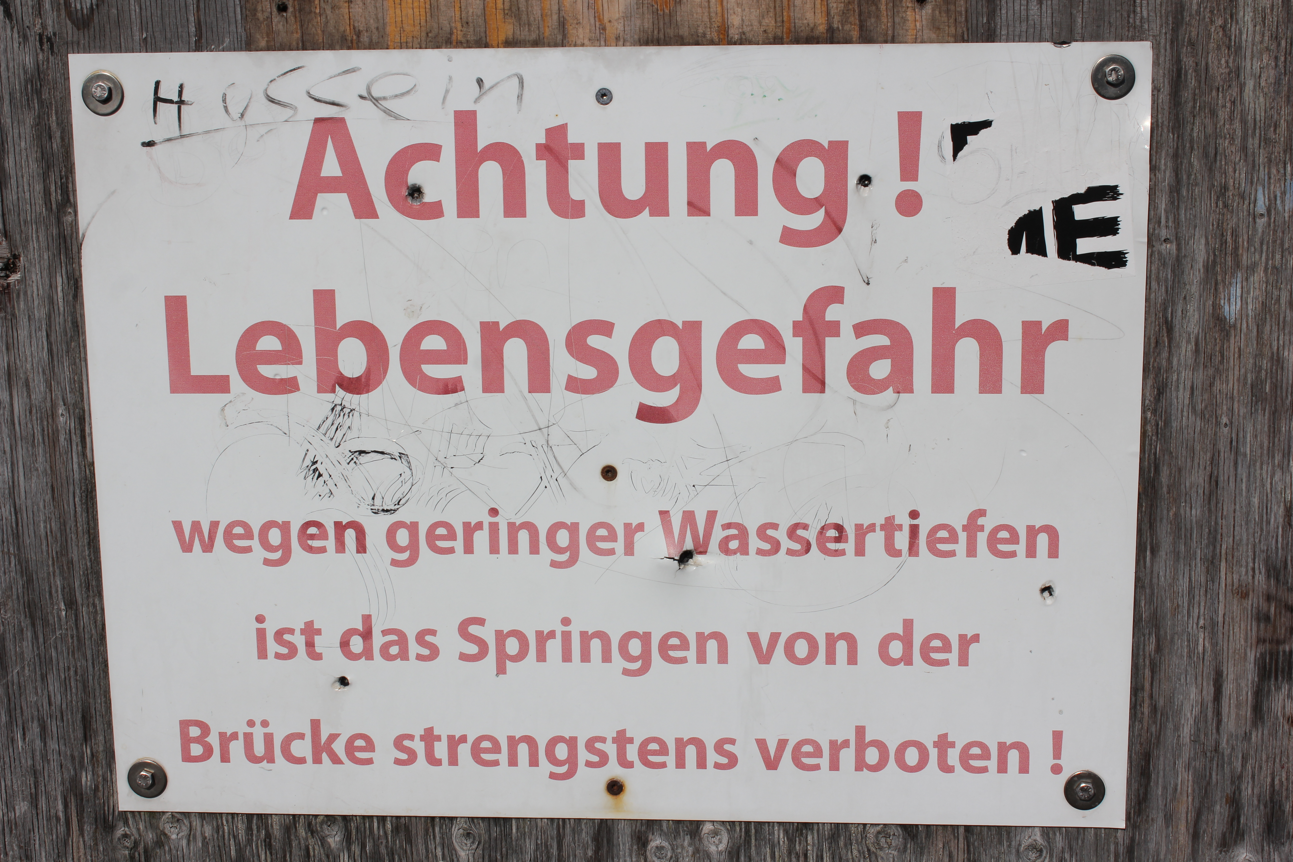 Brücke Ostseebad, Warnschild, Lebensgefahr, Springen verboten (Ostseebad Flensburg)